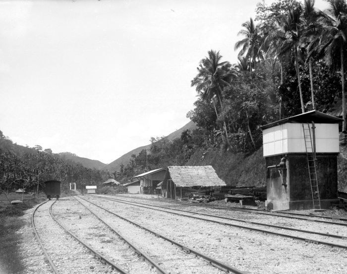 Negatief. halte Kandang Ampat op de lijn Kajoe Tanam-Padang Pandjang. . Spoorlijn Kajoe Tanam-Padang Pandjang op Sumatra, bij station Kandang Ampat